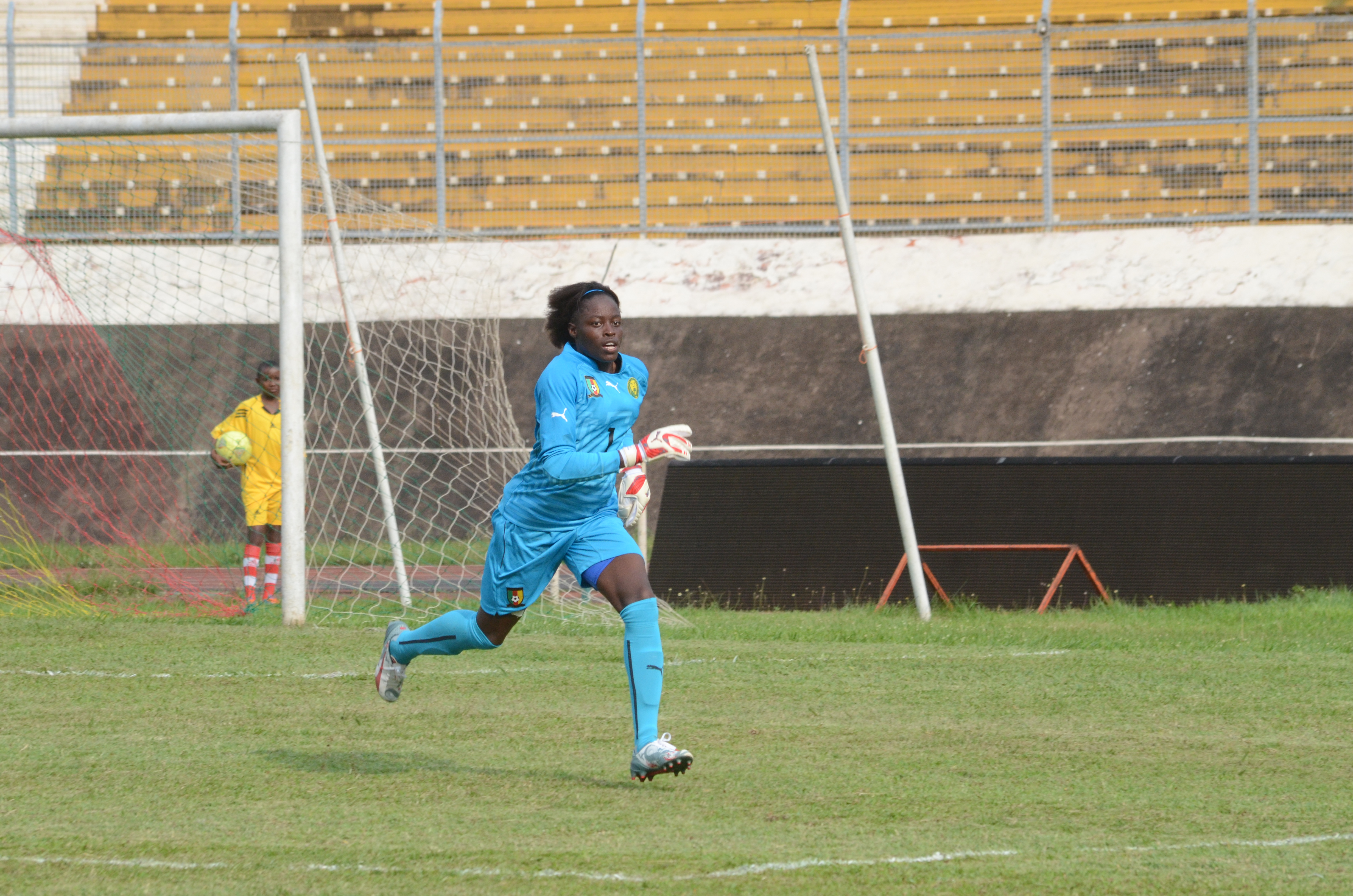 La gardienne des buts de l'équipe nationale de football du Cameroun, les lionnes indomptables